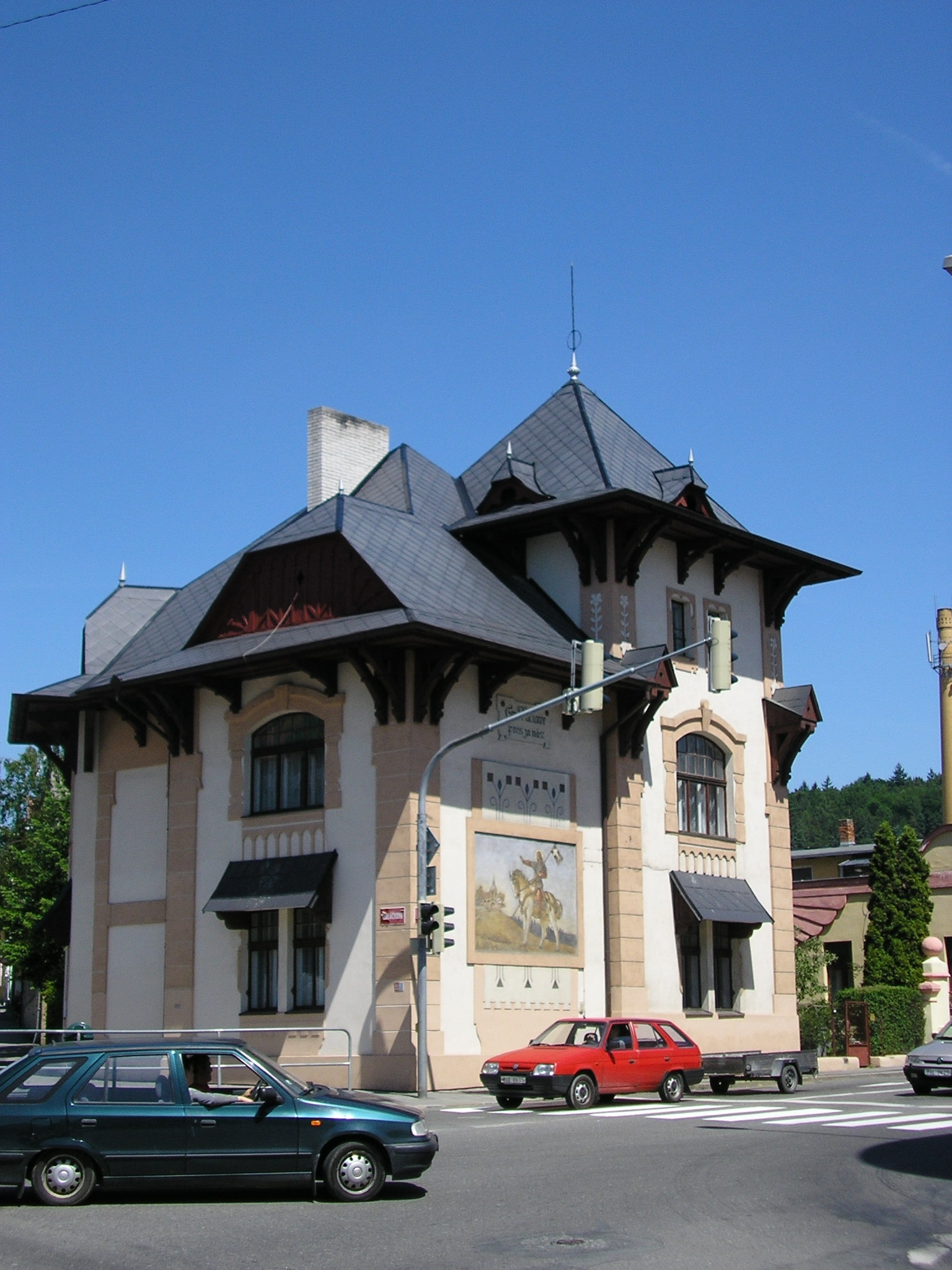 Raabova vila, Sedláčkova 434/1, Budějovické Předměstí, Písek (město).